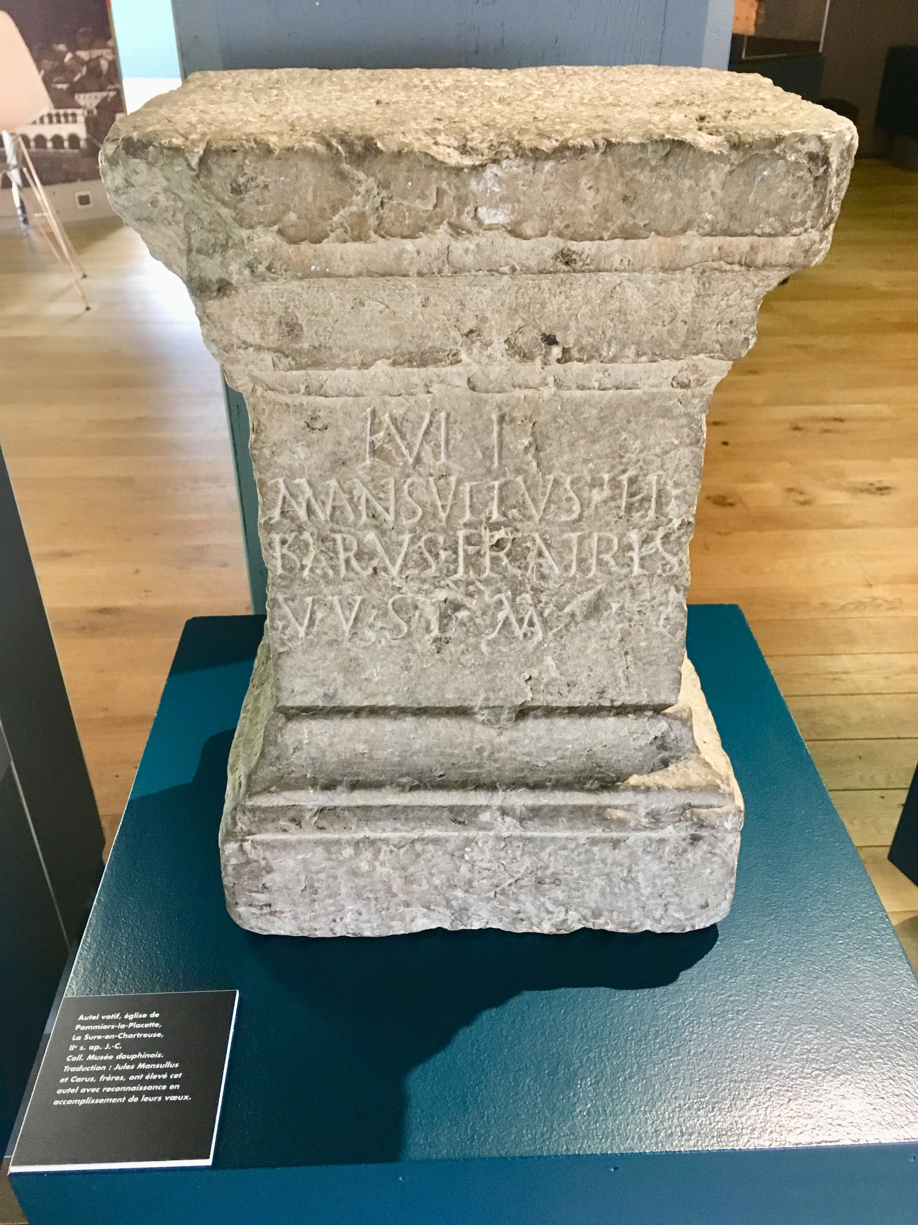 Autel Votif gallo-romain retrouvé sur le territoire de la commune de Pommiers-la-Placette Daté du IIème siècle a.p. Jésus Christ Exposition Pays Voironnais Collection Musée Dauphinois, Grenoble, Isère